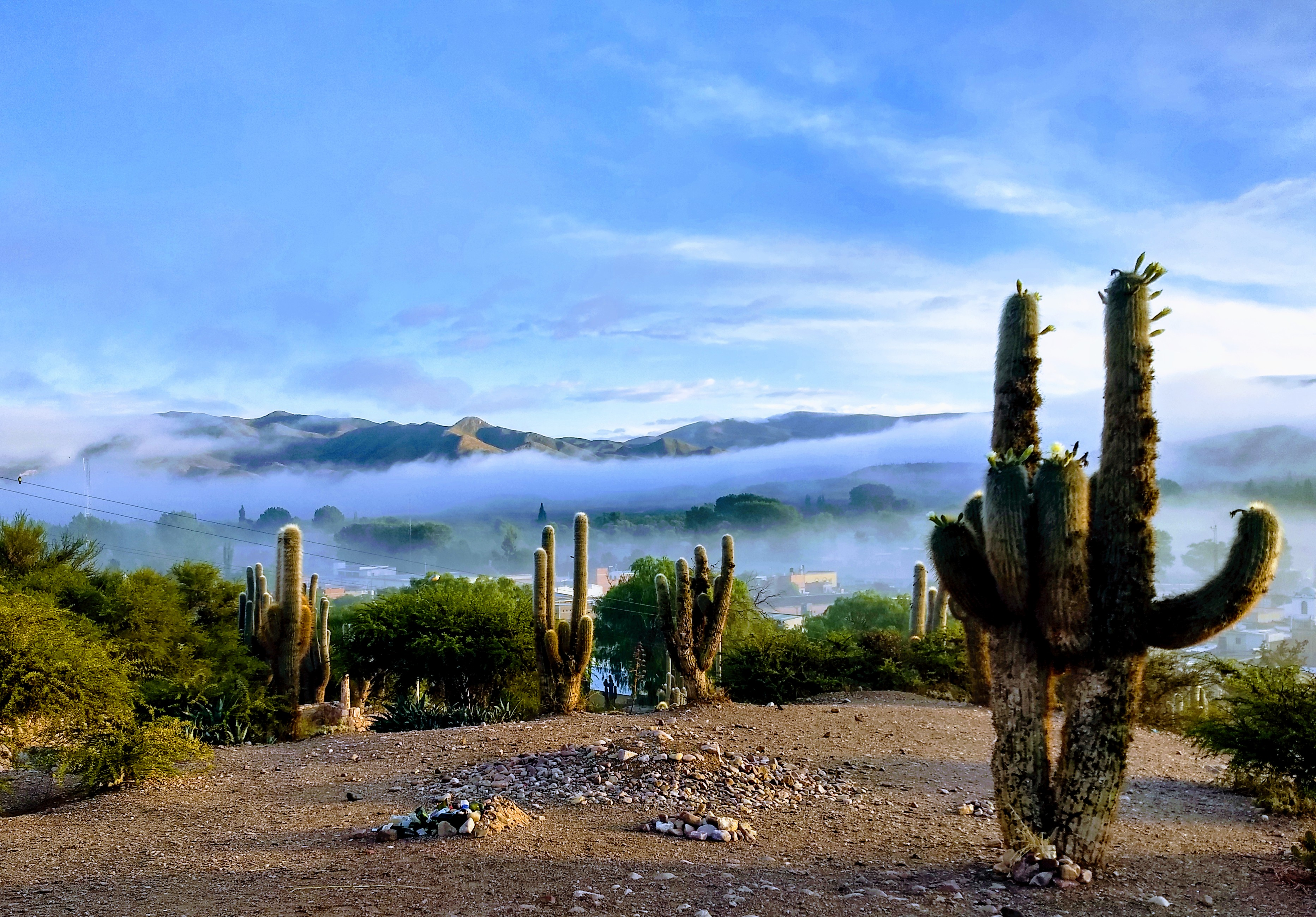 La foto fue tomada desde los primeros escalones del sendero que conduce al Monumento de los Héroes de la Independencia.